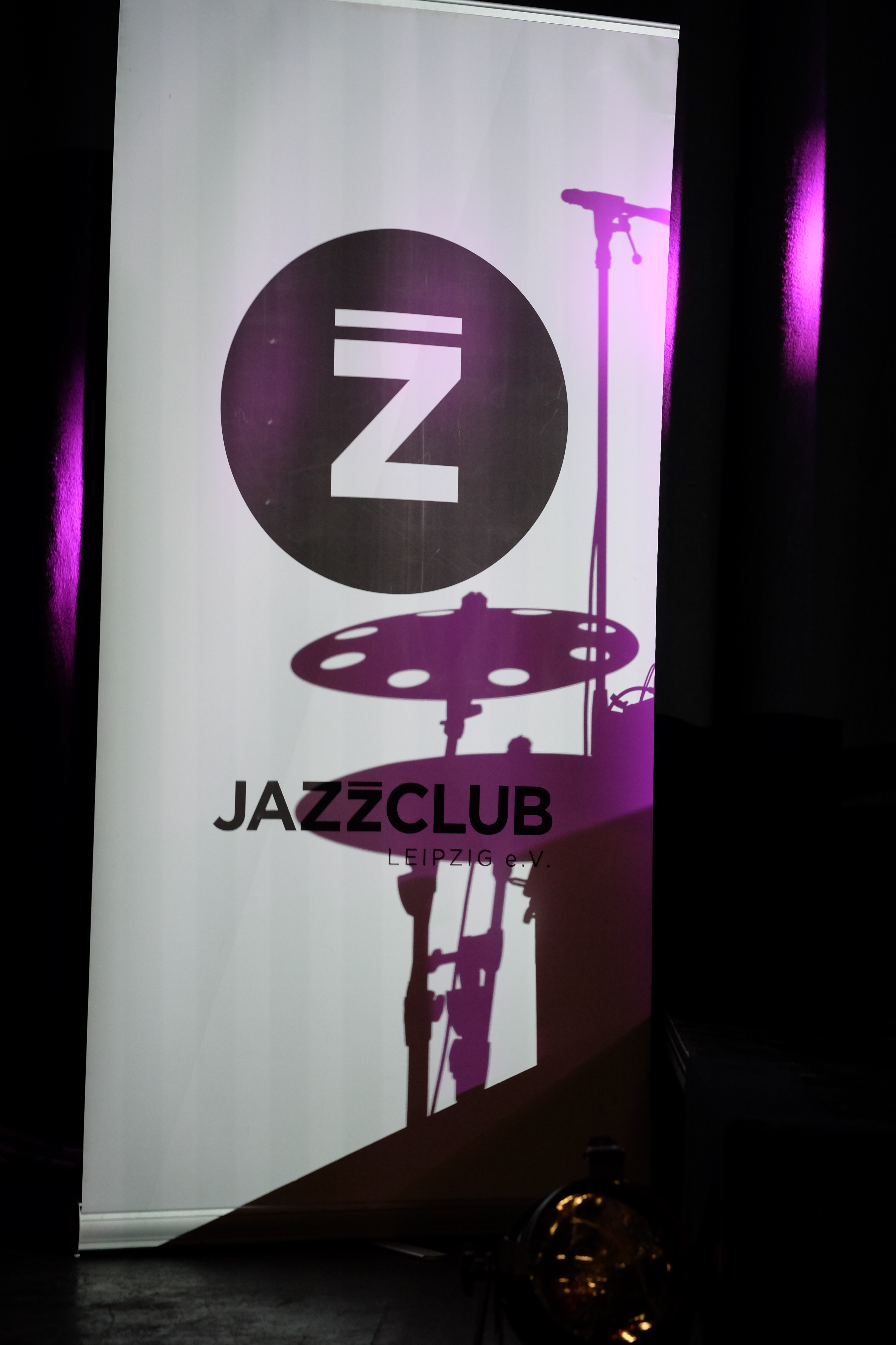 Logo des Jazzclub Leipzig auf einem Banner